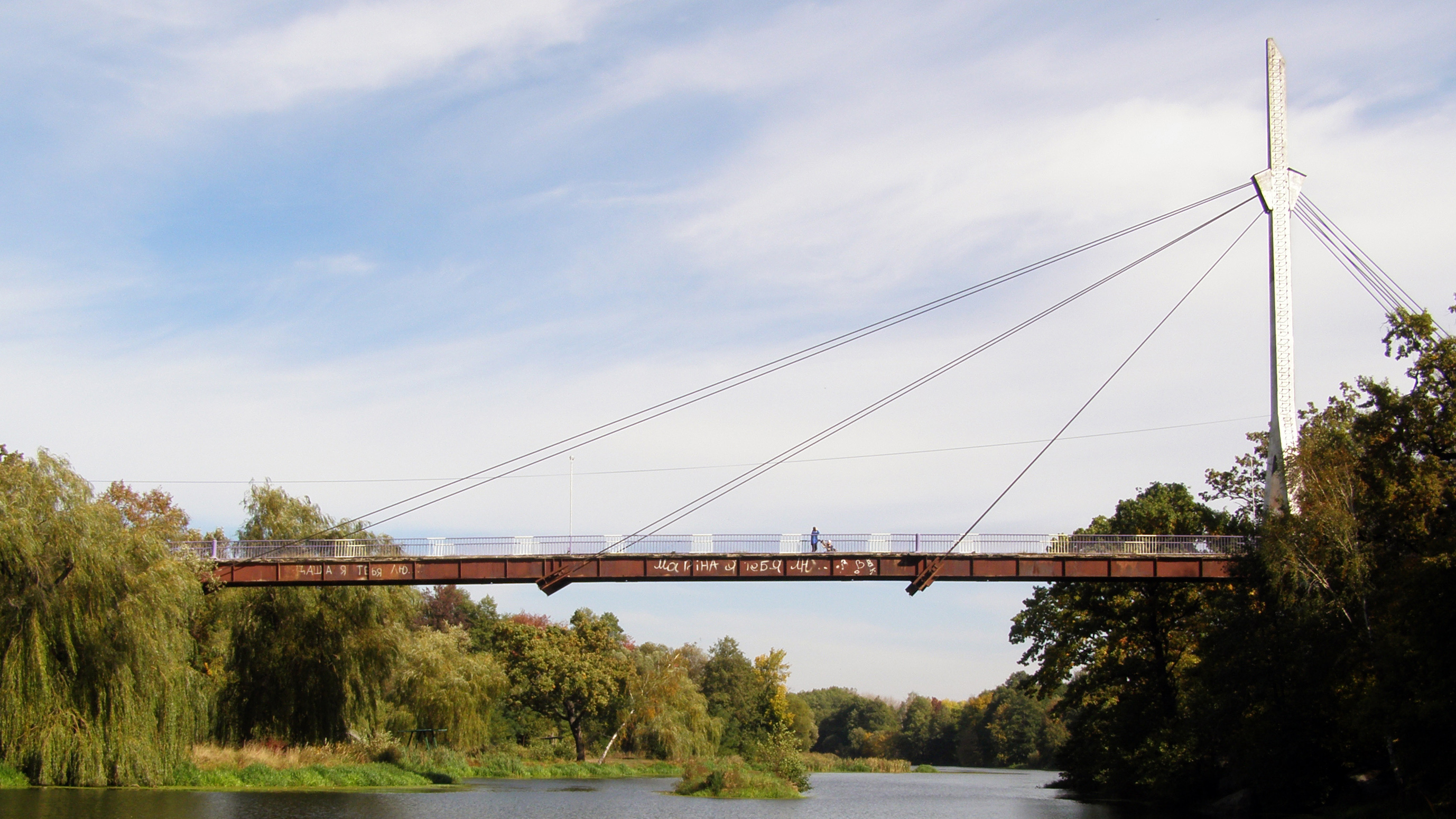 Вантовый однопилонный пешеходный мост в г. Коростень, Житомирской обл., Украина